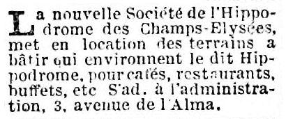 Annonce concernant l'Hippodrome des Champs-Élysées ouvert le 11 septembre 1875 à Paris.